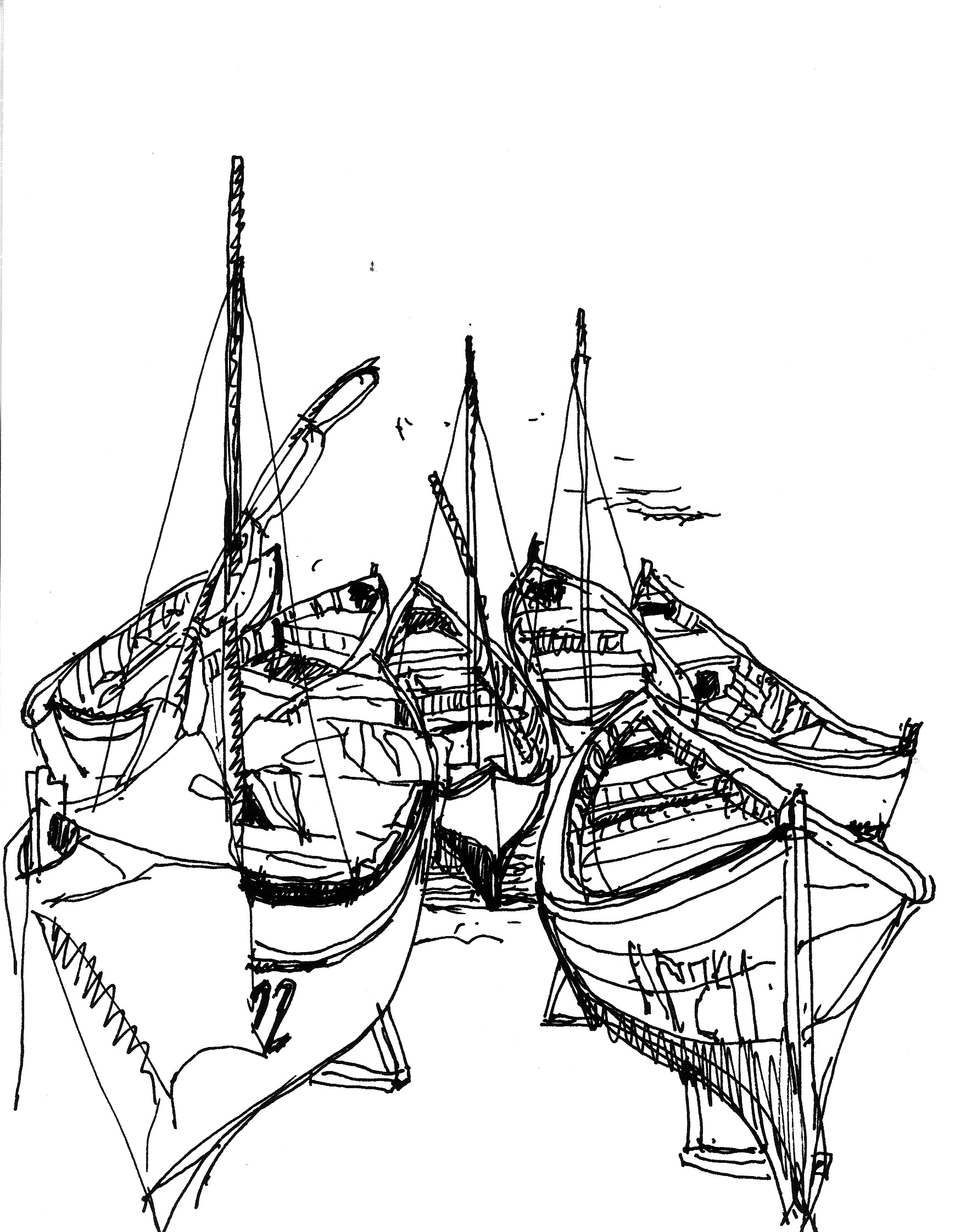 skisse av greske fiskebåter, av den dansk/norske arkitekten Birgit Cold